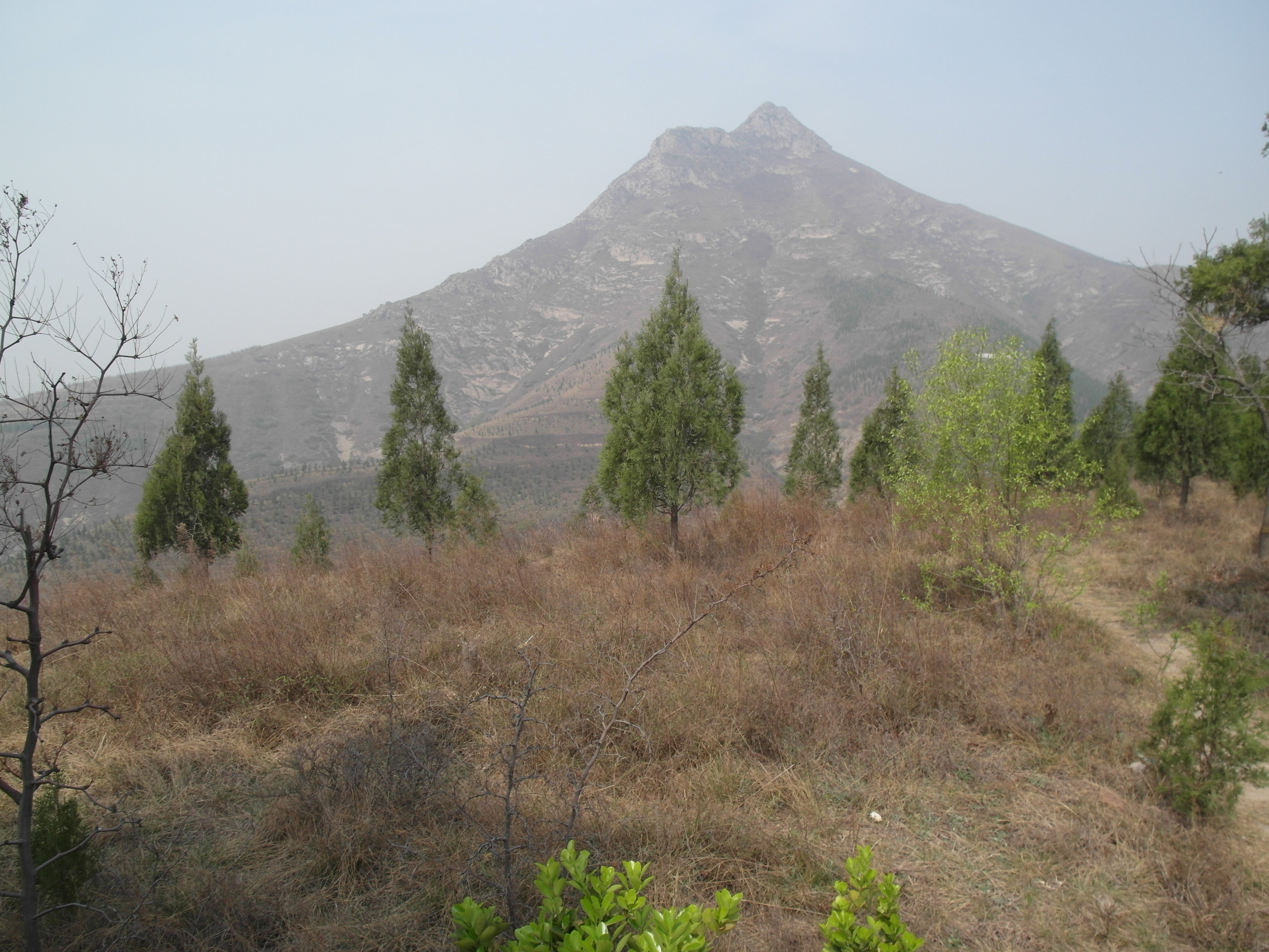 位于咸阳市礼泉县北的九嵕山上